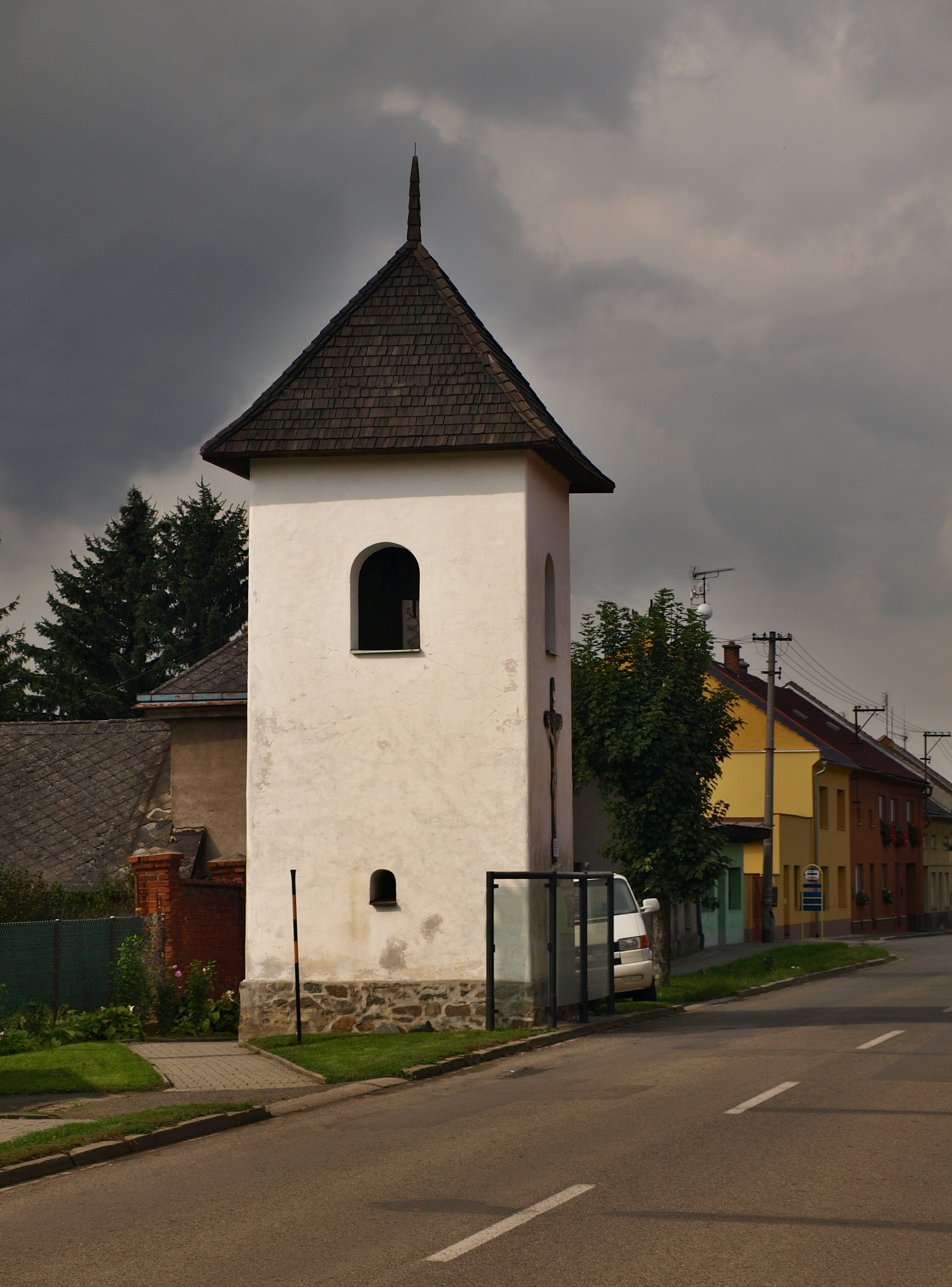 Zvonice, náves, proti čp. 41, Čechy (okres Přerov).